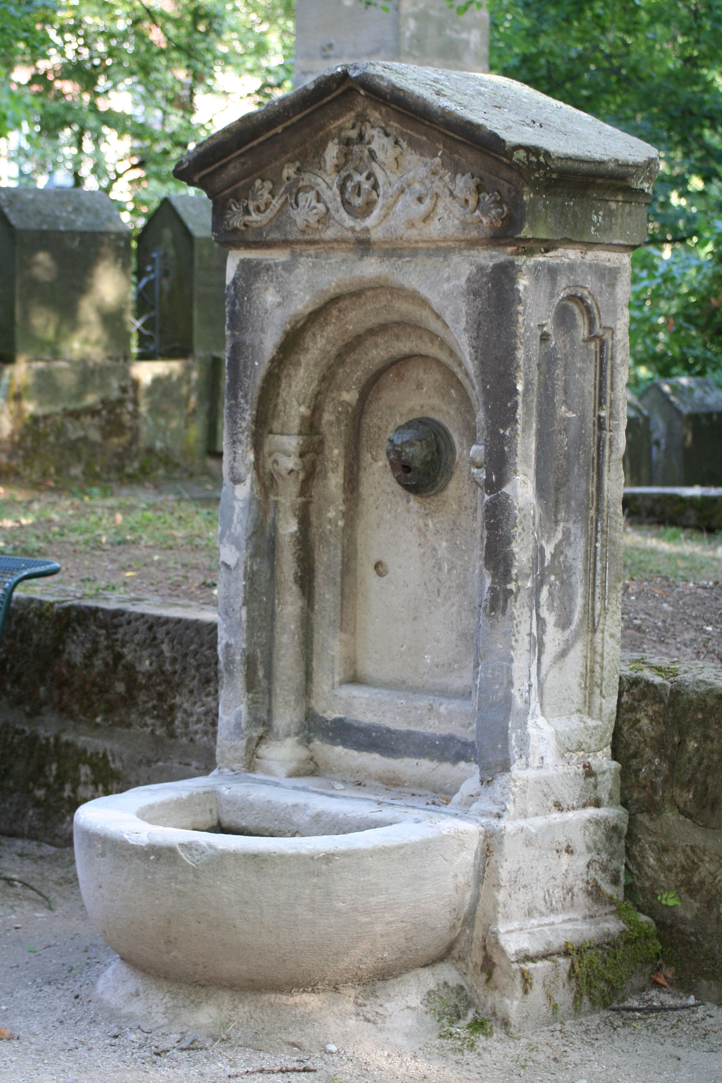 Brunnen auf Salvatorfriedhof in Coburg